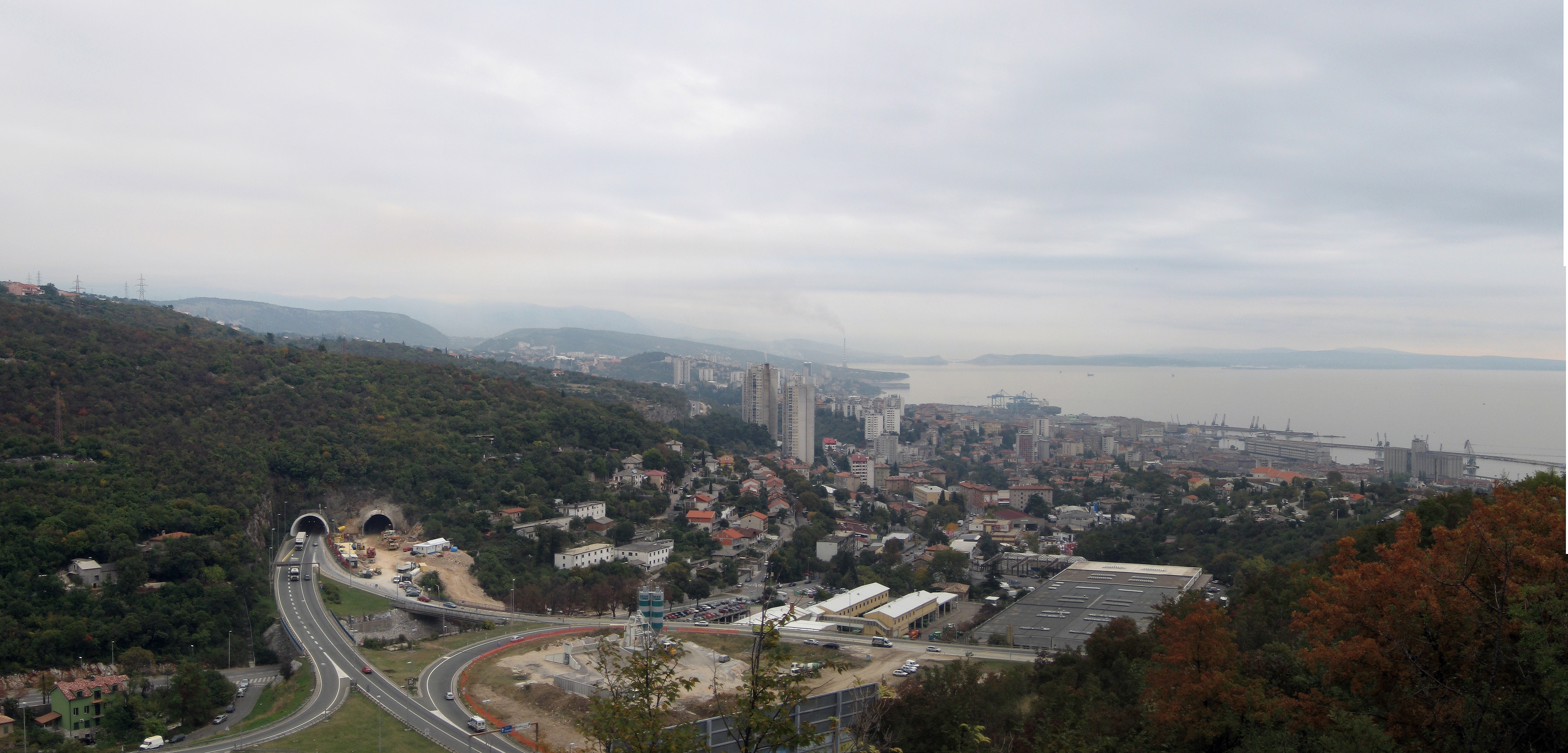 panorama čvora Škurinje